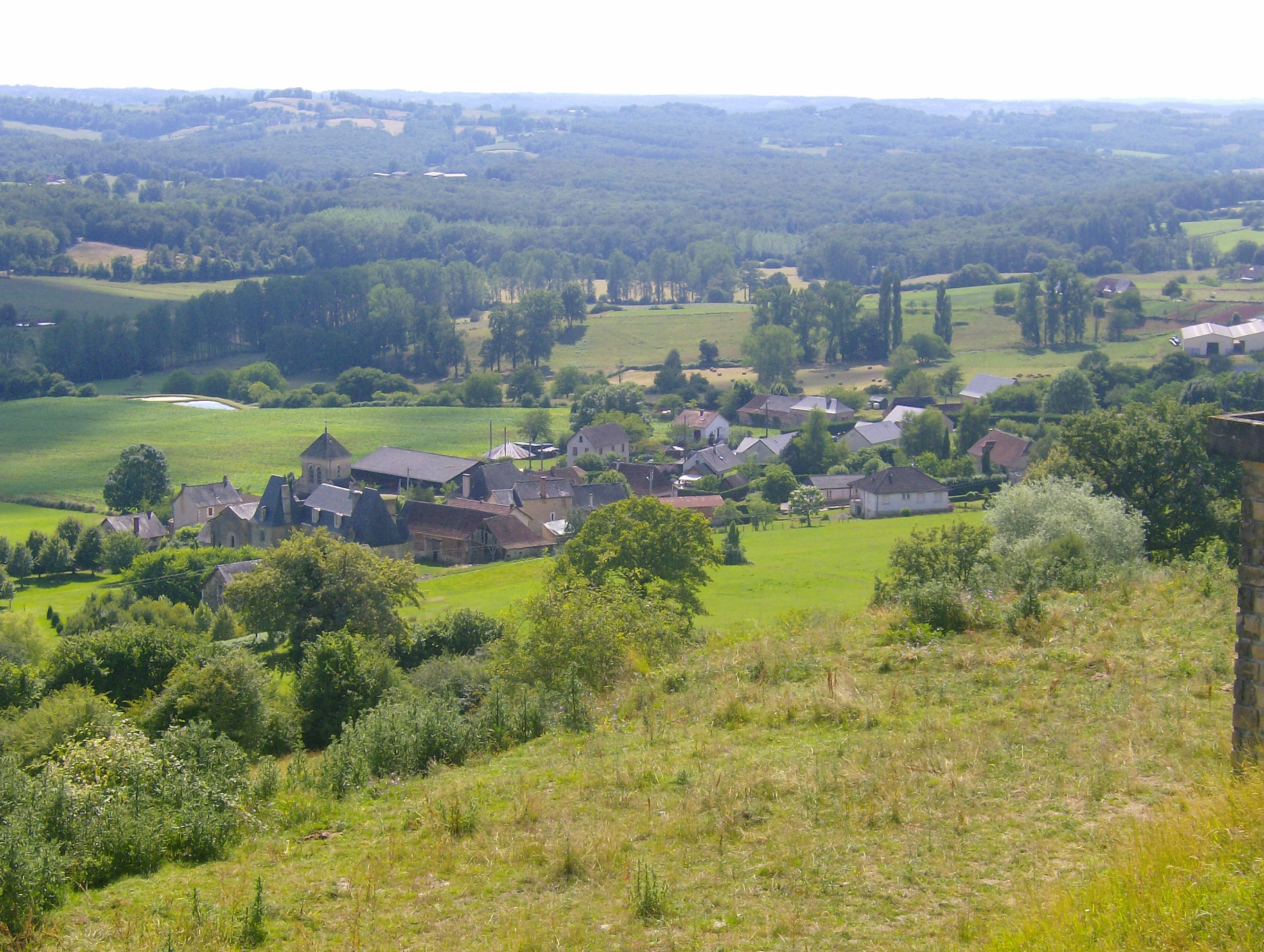 Bourg de Segonzac vu du puy de Segonzac